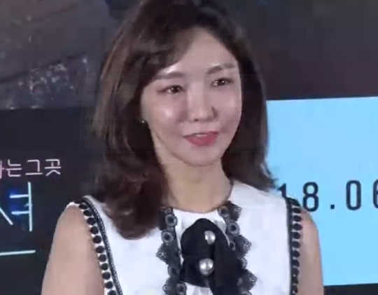 Shin So yul actriz surcoreana